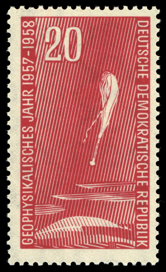 Information: Ausgabepreis: First Day of Issue / Erstausgabetag: Auflage: Entwurf: Druckverfahren: Michel-Katalog-Nr: Ländercode-MiNr